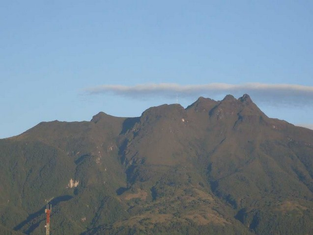 Visto desde el municipio de Herveo - Tolima